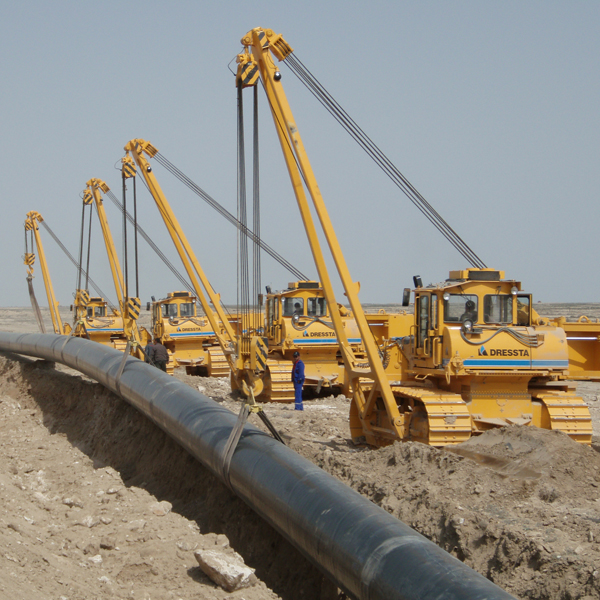 Układarka rur SB-85 marki DRESSTA